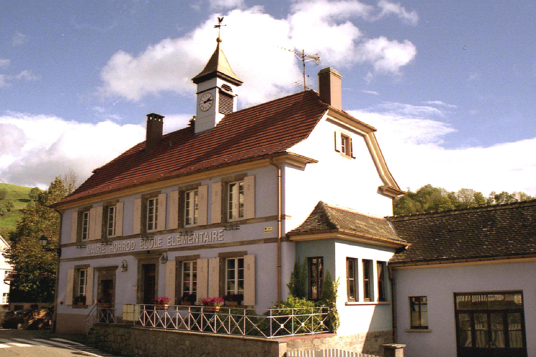 Mairie de Hohrod Photo : Samuel Wernain (25 octobre 2006).